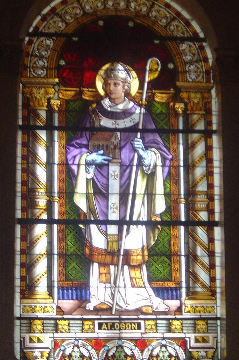 Bildfenster mit Darstellung des heiligen Otto von Bamberg, des Namenspatrons König Ottos von Griechenland aus dem Haus Wittelsbach